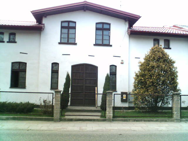 Dawny zajazd w Szadółkach. autor Tomasz Steifer, 2004